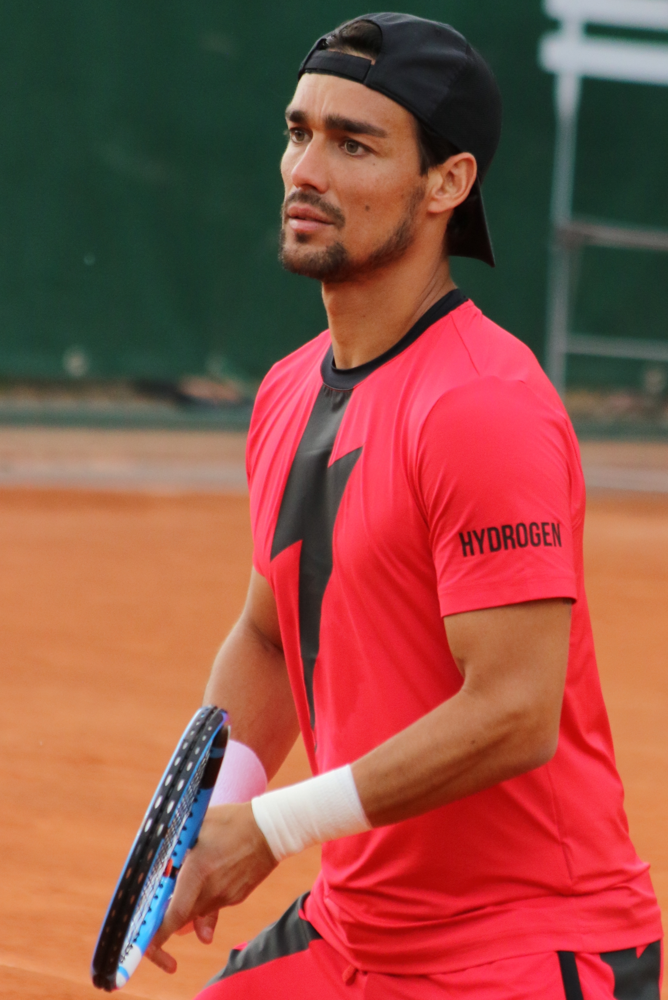 Fognini RG18 (5)